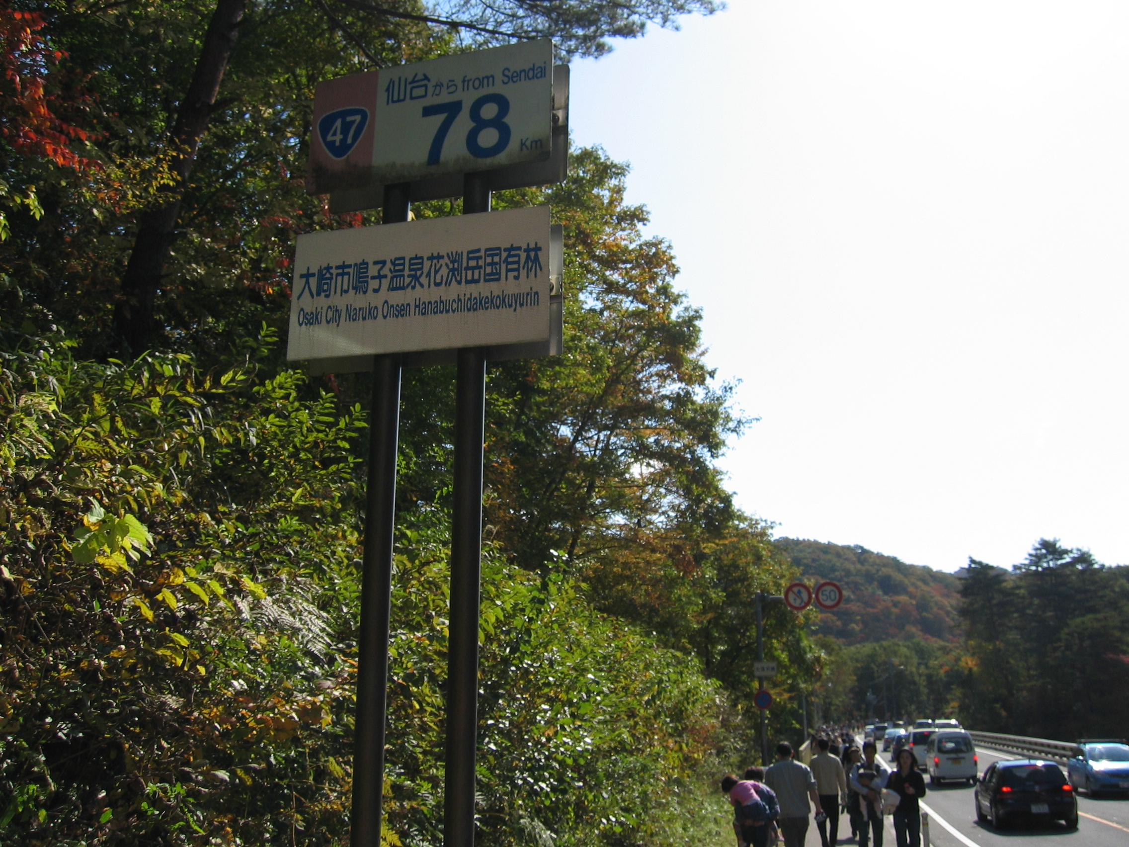 国道47号線鳴子峡付近（宮城県大崎市）